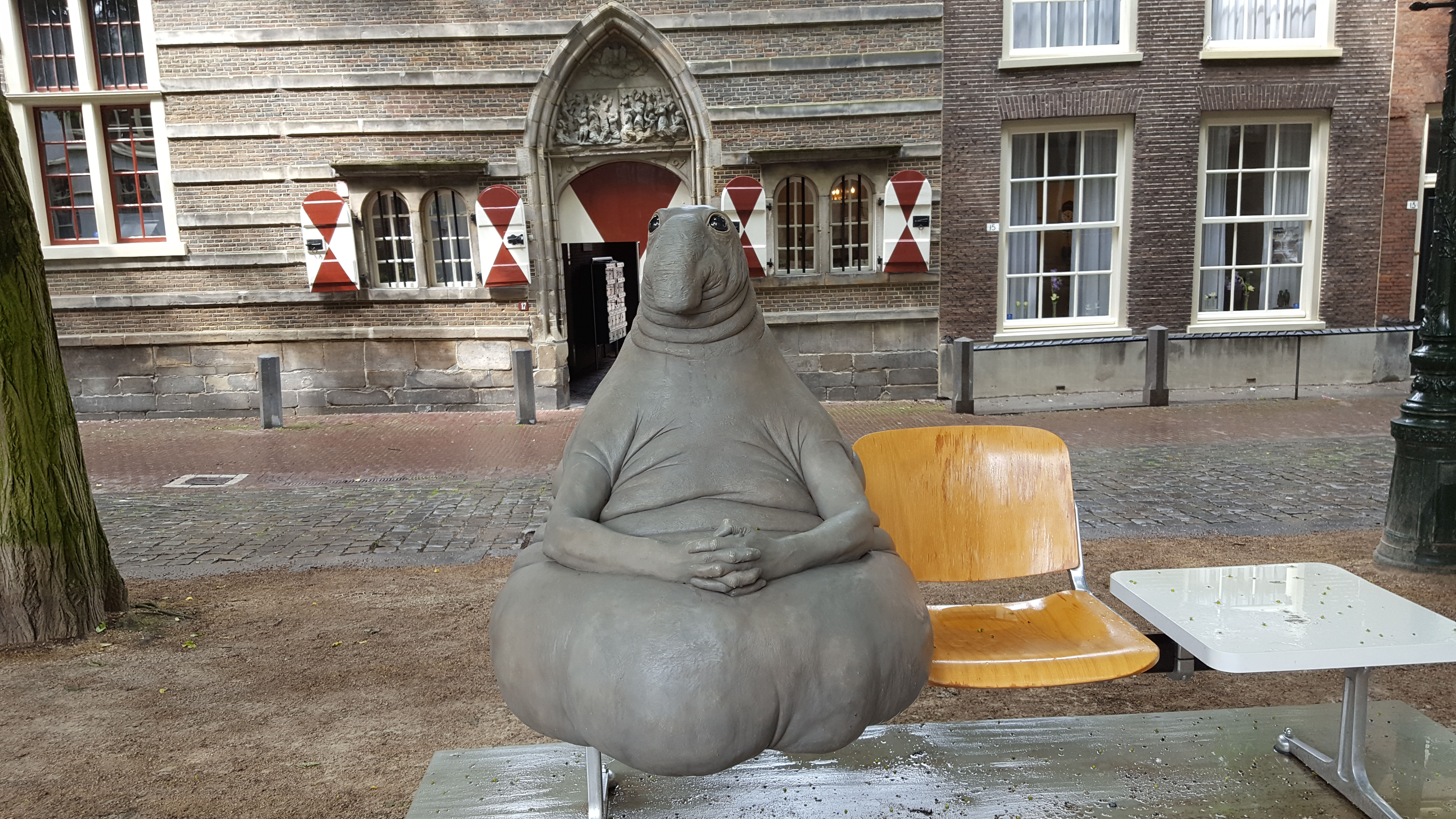 'Beelden in Leiden' 2016. Margriet van Breevoort (1990) - Homunculus Loxodontus